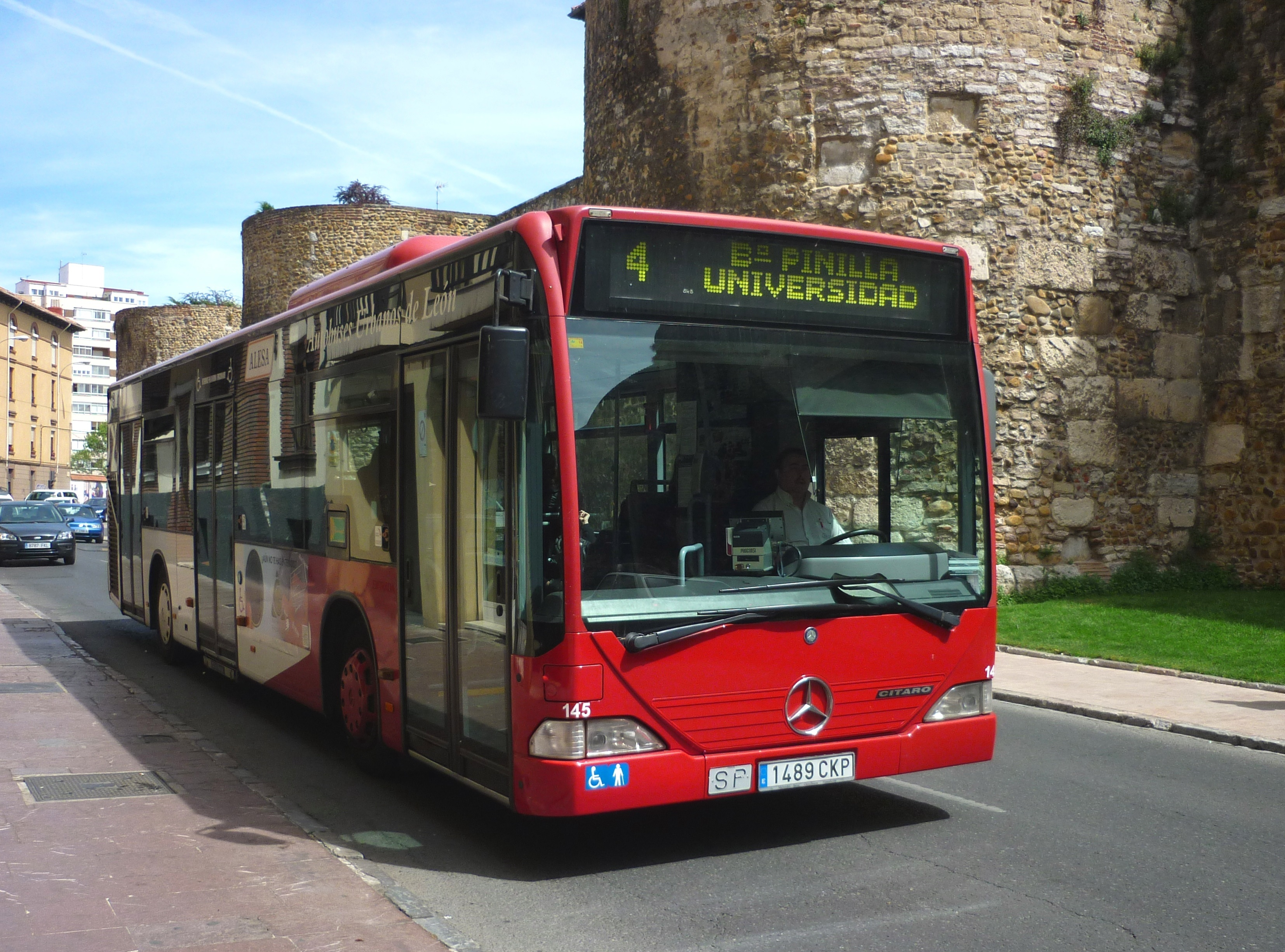 ALSA - 4145